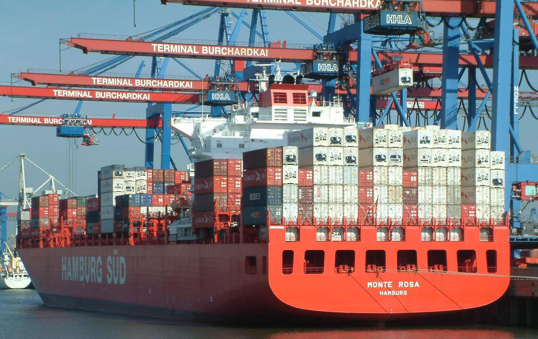 Containerschiff MONTE ROSA